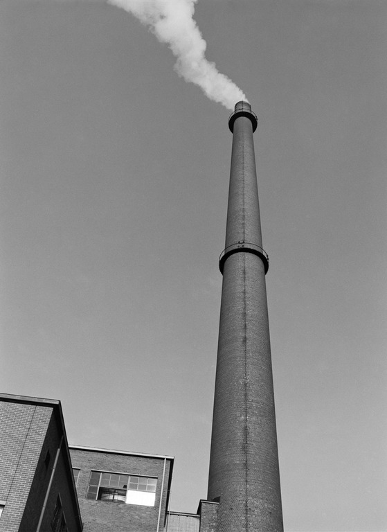 Kyläsaaren jätteenpolttolaitoksen savupiippu. Kuva vuodelta 1976.